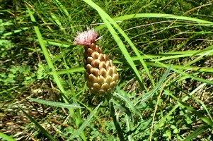 Rhaponticum coniferum, meyrueis